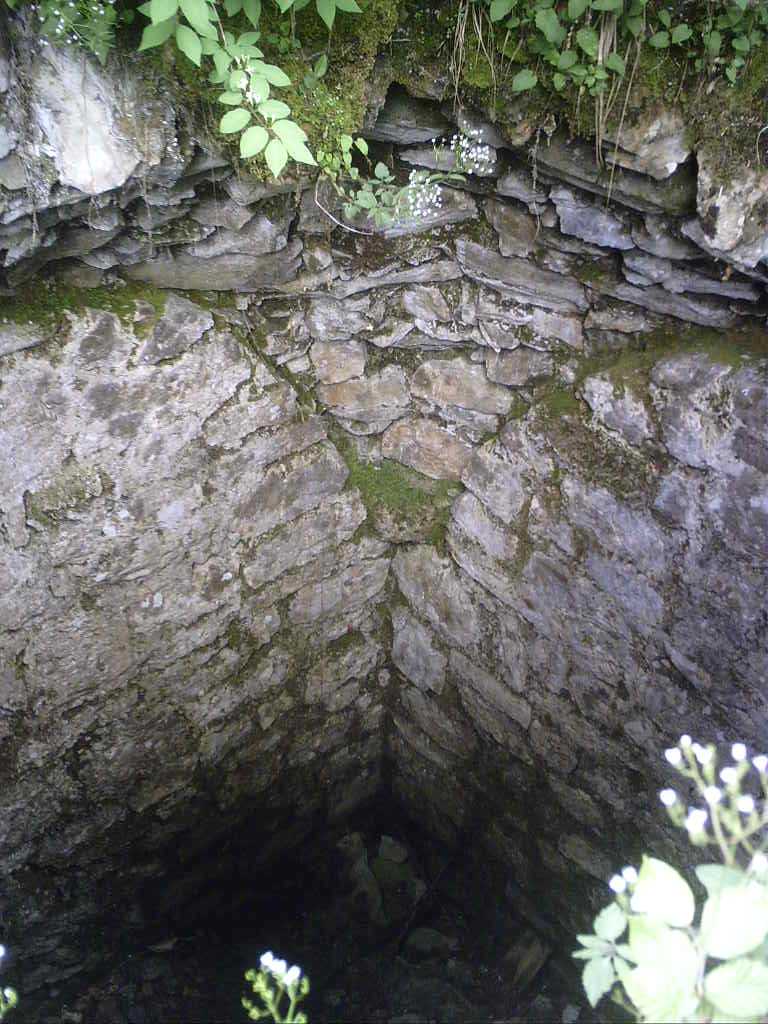 Ruine der Hohenburg